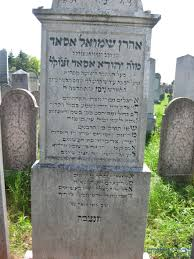 מצבת קברו של רבי אהרון שמואל אסאד